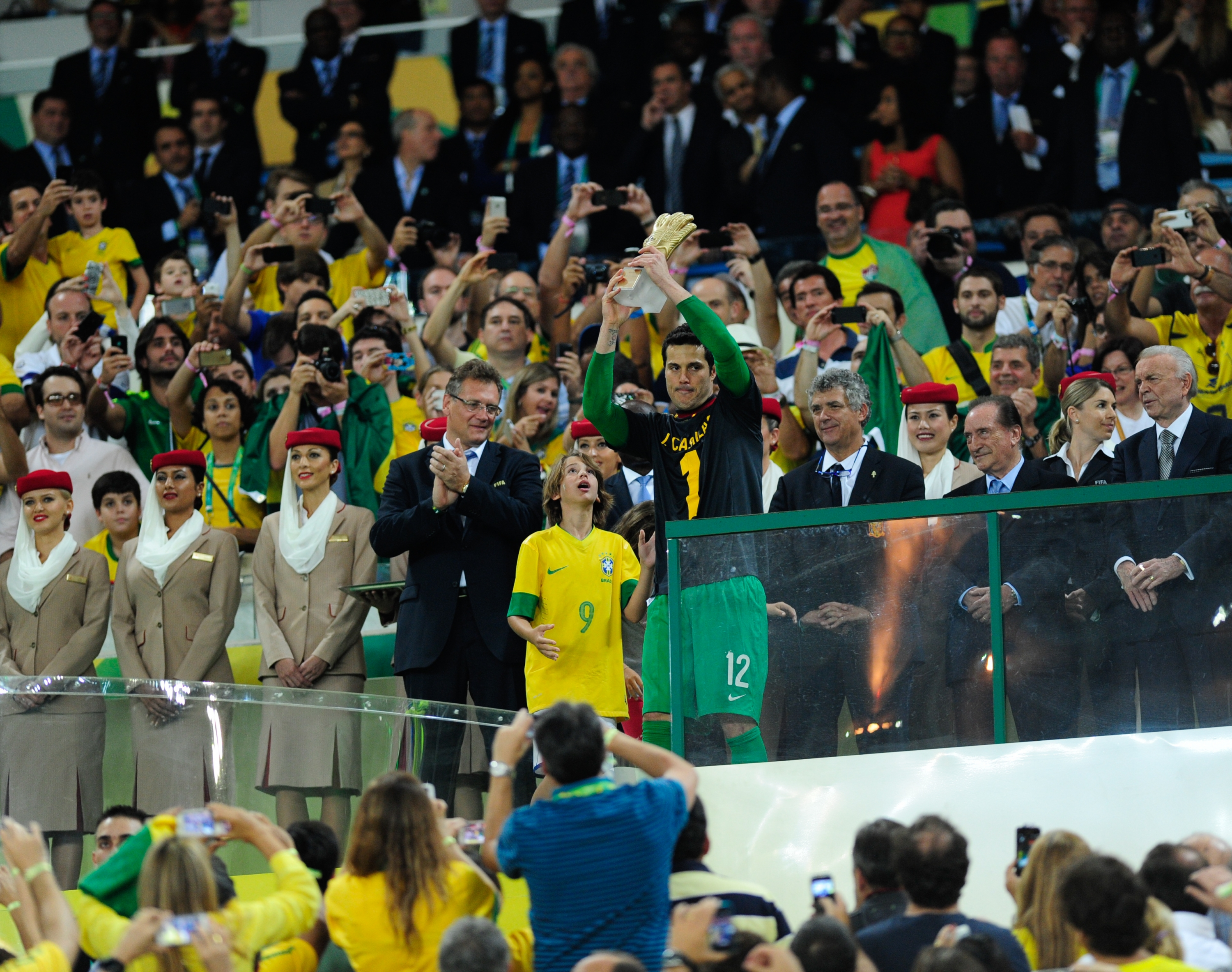 No Estádio do Maracanã, Brasil e Espanha disputam a taça da Copa das Confederações de 2013.